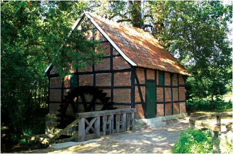 Handrup / Hesemannsche mühle